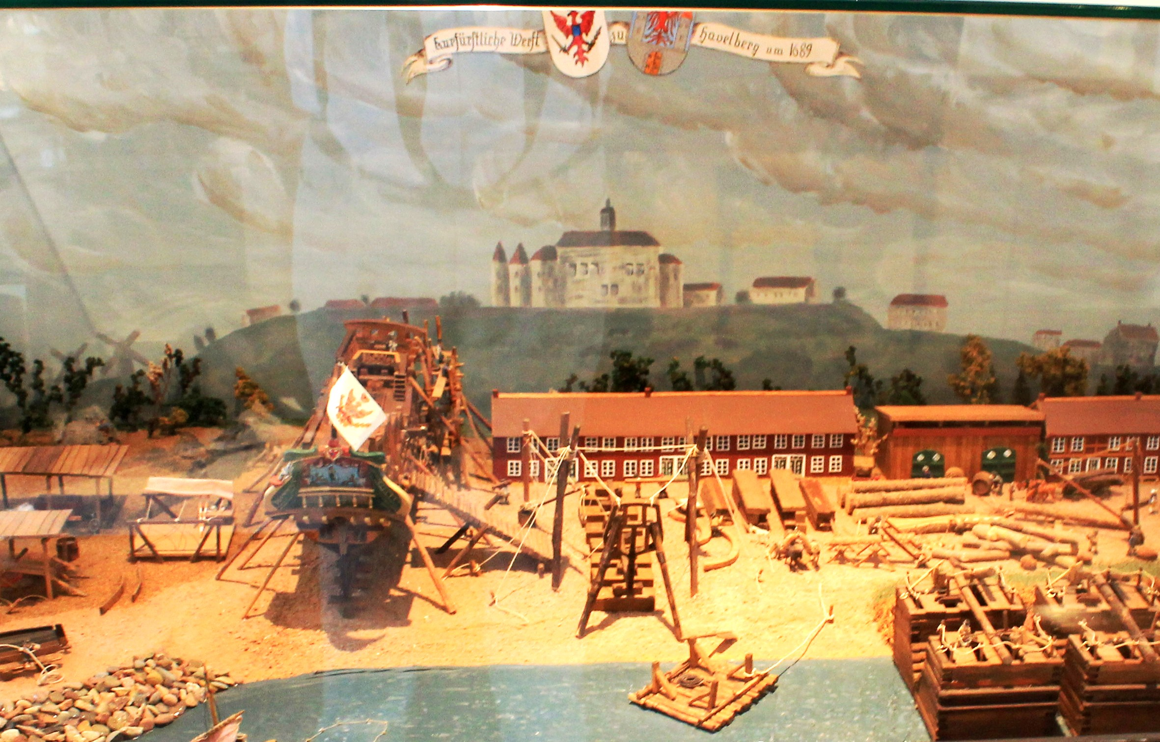 Modell der Kurfürstlichen Werft